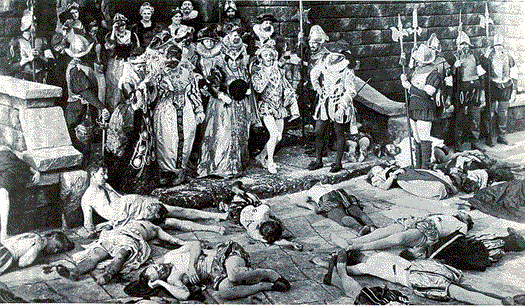 Transferred from pl.wikipedia to Commons by Maksim. The original description page was here. All following user names refer to pl.wikipedia. kadr z francuskiego filmu z 1916 r. źródło: Original upload log Legenda: (bież) = to jest obecny plik, (usuń) = usuń tę starszą wersję, (przywróć) = przywróć tę starszą wersję. Kliknij na datę aby ściągnąć lub zobaczyć wersję tej grafiki wysłaną tego dnia. (usuń) (bież) 17:04, 22 gru 2005 . . Wikipedysta:Tompot Tompot ( Dyskusja_Wikipedysty:Tompot Dyskusja) . . 525x306 (91460 bajtów) ({ { PD-old } } kadr z francuskiego filmu z 1916 r. źródło